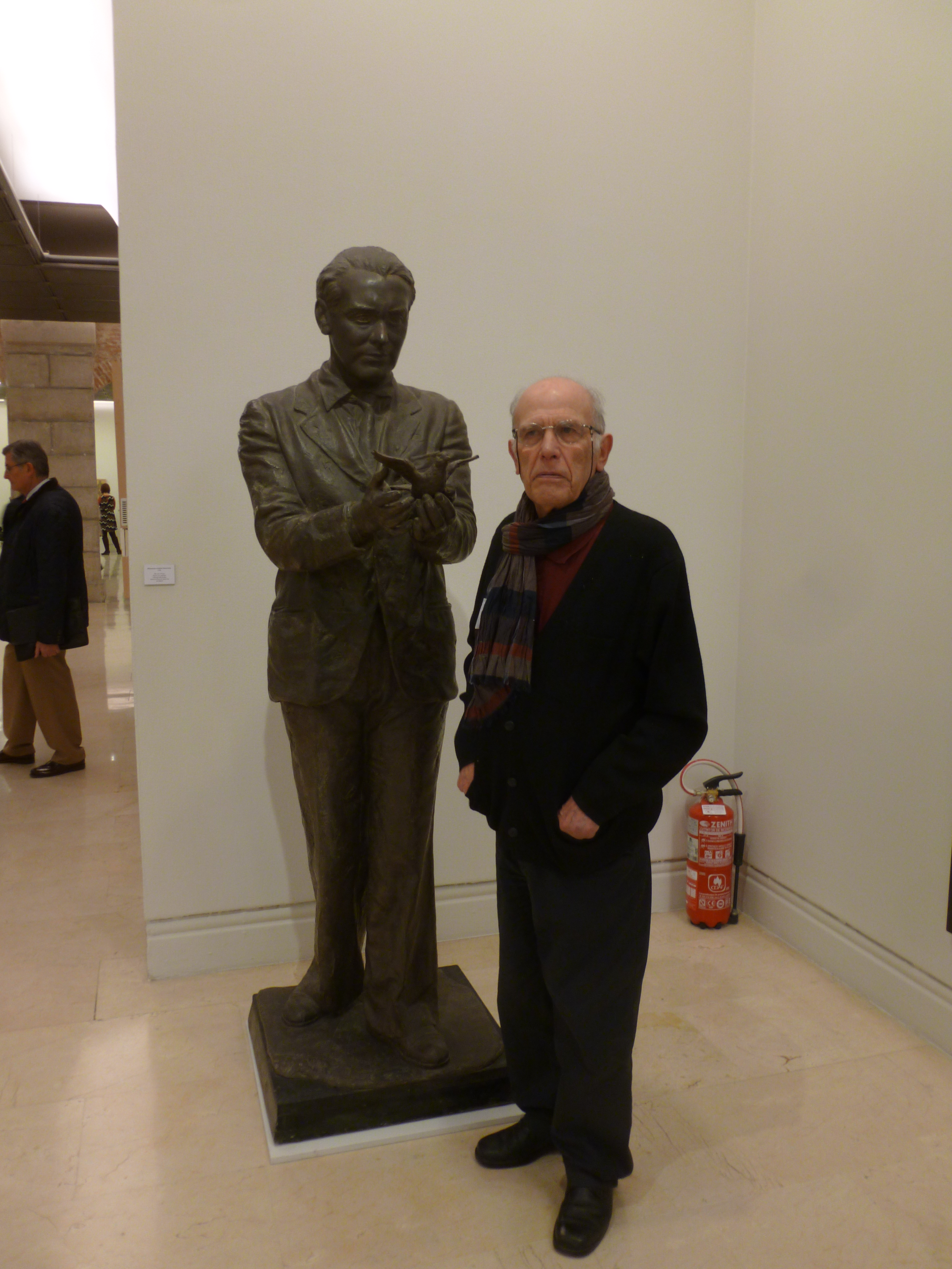 Julio López Hernández durante la exposición “El camino inverso”, organizada por la Real Academia en colaboración con la Fundación Banco Santander.